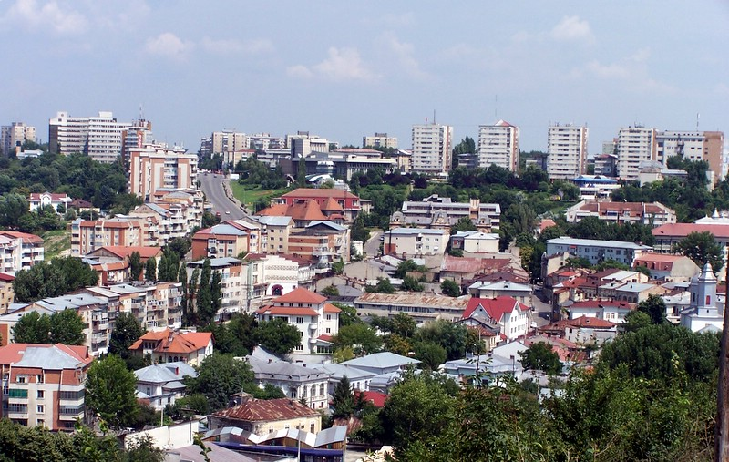 Vedere de pe delul Gradiste asupra "Orasului de Jos" din Slatina, din iulie 2005.